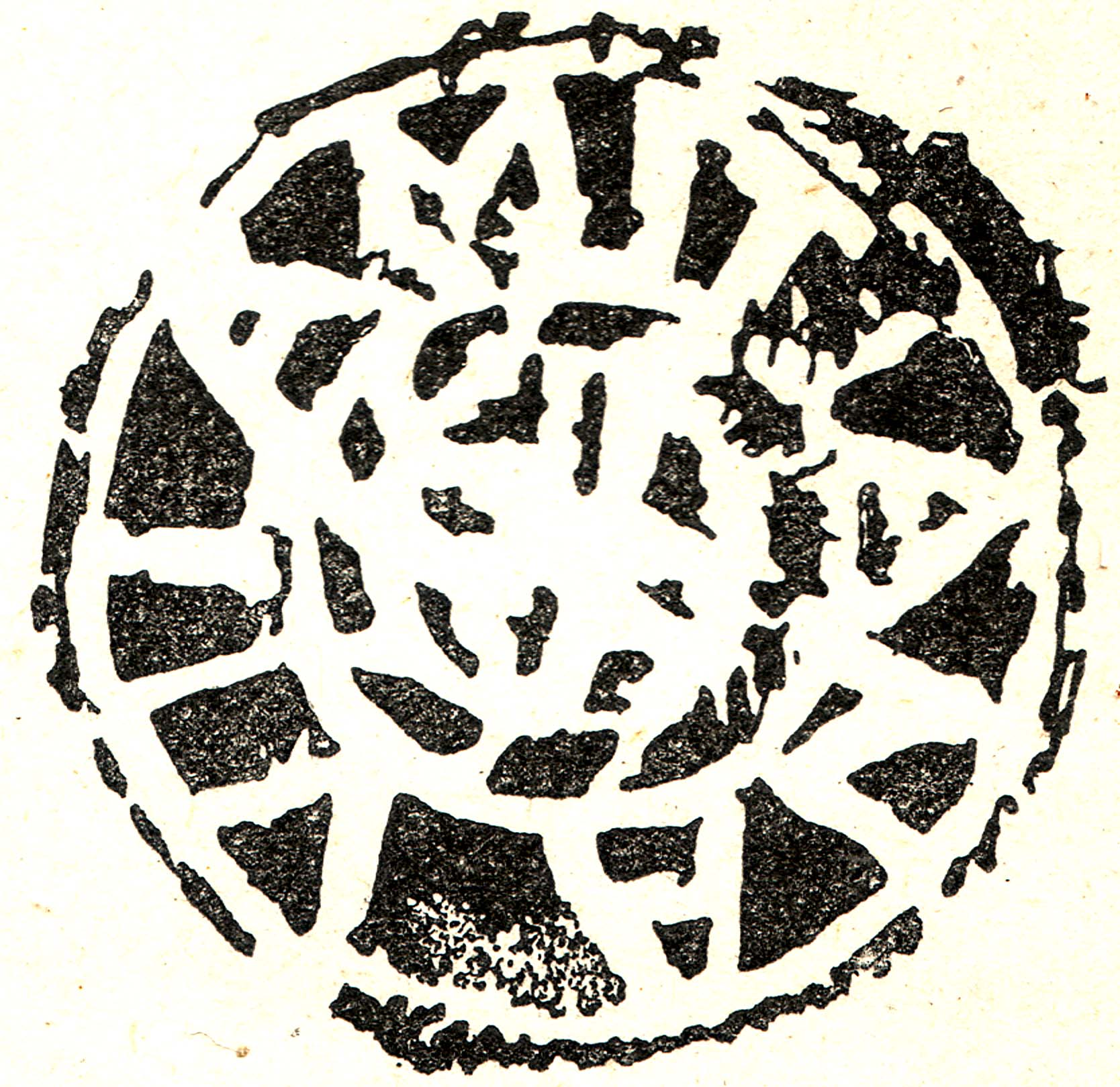 Segell antic de l'ajuntament de Vilamitjana (Tremp, Pallars Jussà)